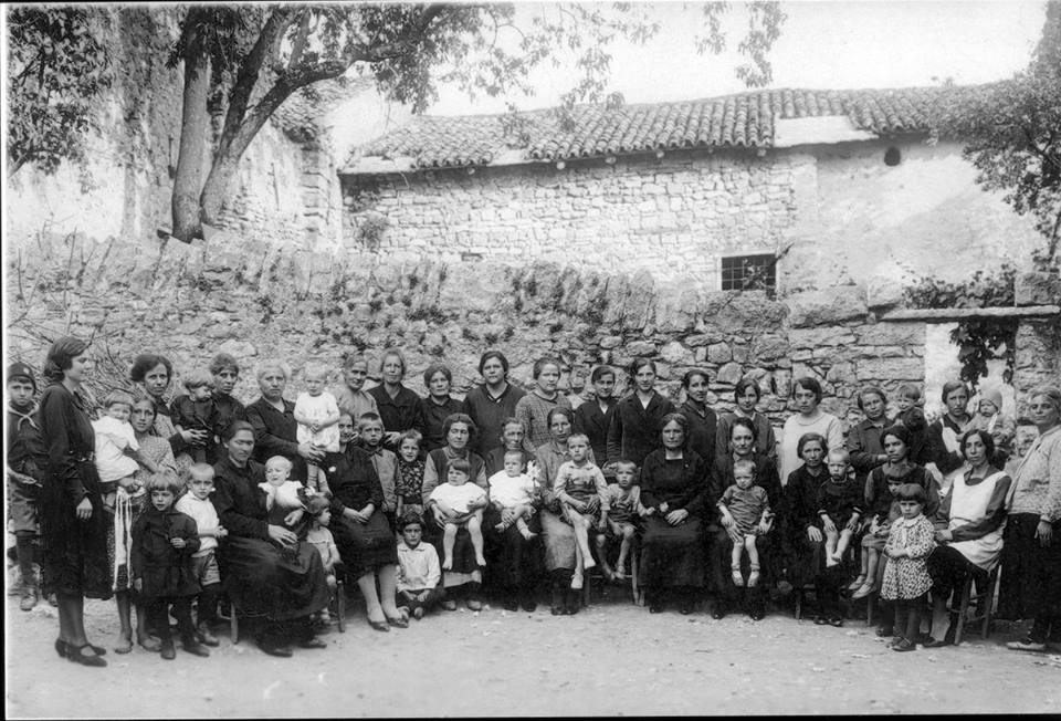 Prun (frazione di Negrar) in una foto d'epoca